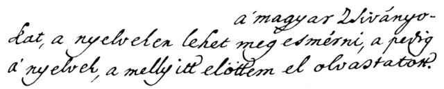 Czagány András zsiványvezér vallomása az előtte felolvasott tolvajnyelvi szójegyzékről és a zsiványnyelvről 1776-ból